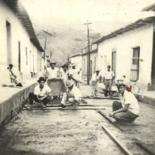 Gramalote Norte de Santander, Colombia. Foto de los años 40.